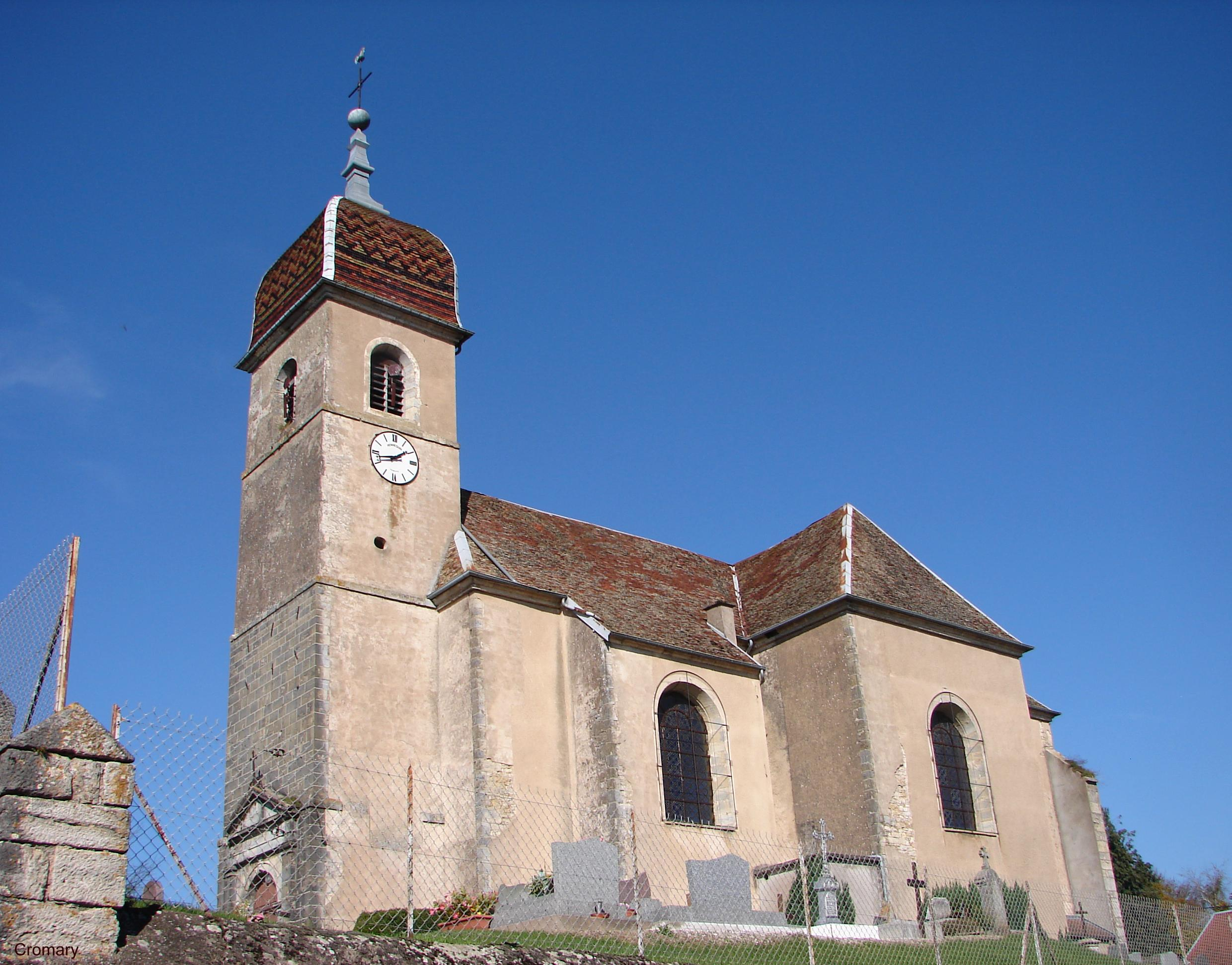 église du village de cromary (70)